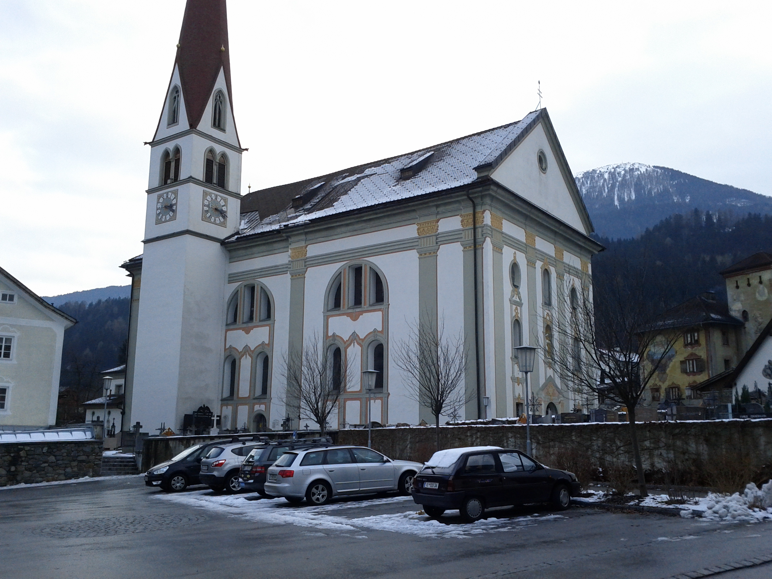 Katholische Pfarrkirche hl. Petrus